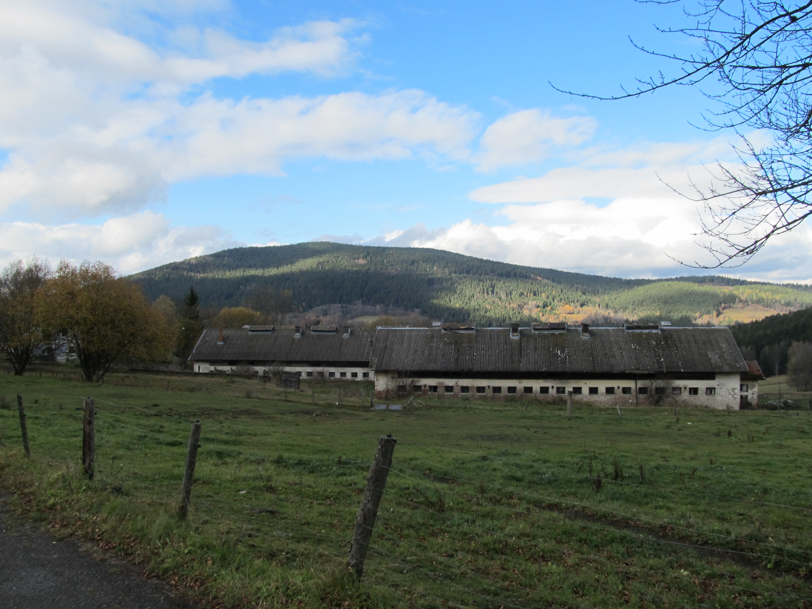 Srní (Sedlo) - pohled na horu Křemelnou